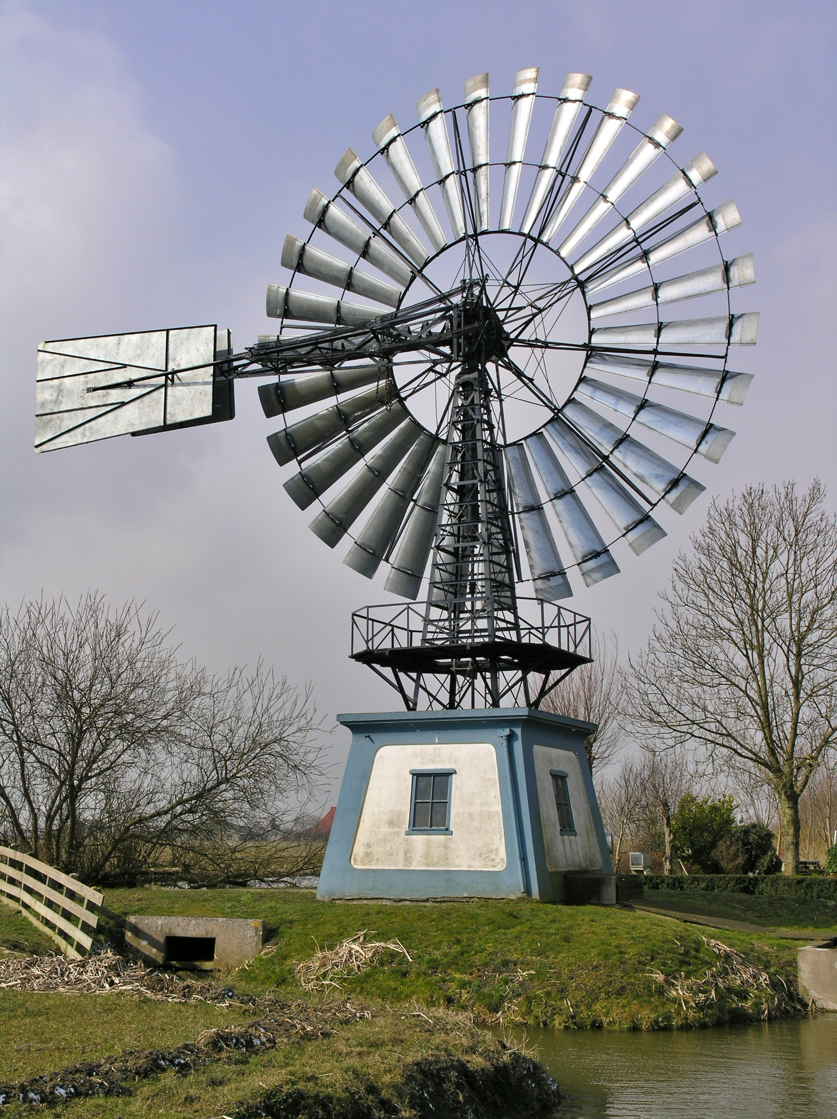 Tirns Windmotor Poldermolen